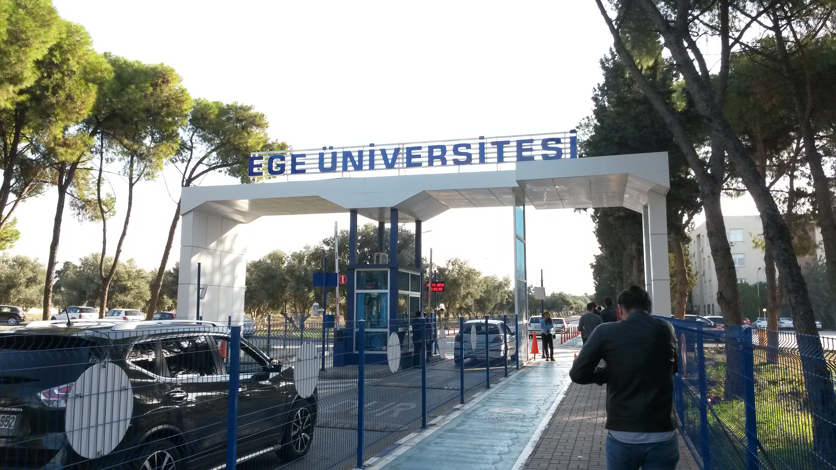 Ege Üniversitesinin giriş kapısı